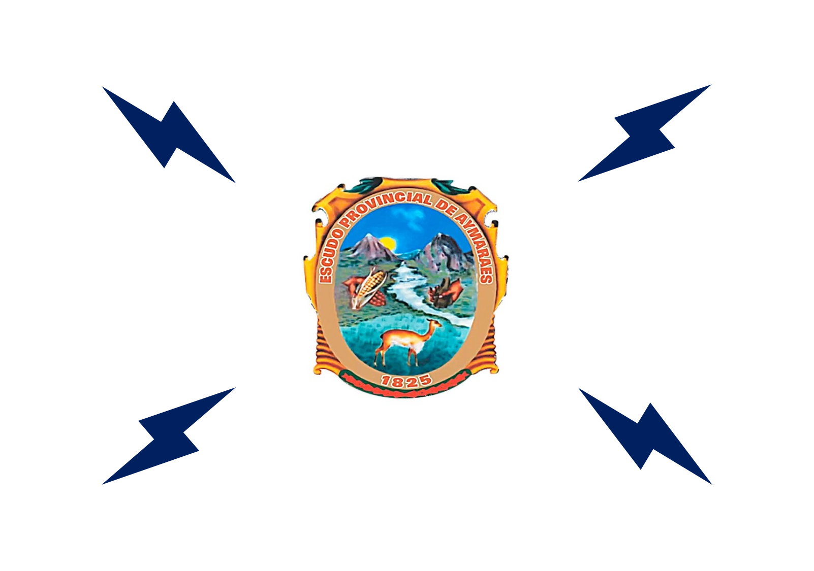 Bandera de la provincia de Aymaraes y del distrito de Chalhuanca - Apurímac